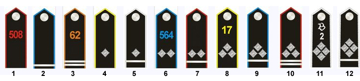 Rangabzeichen der Deutschen Hitlerjugend (DHJ) bis 1945: Mannschaften 1 Hitlerjunge (vergleichbar zu Soldat, OR-1 in Heer und Luftwaffe) 2 Rottenführer (Gefreiter, OR-2) 3 Oberrottenführer (Obergefreiter, OR-3) Unterführer 4 Kameradschaftsführer (Unteroffizier, OR-5b) 5 Oberkameradschaftsführer (Unterfeldwebel, OR-5a) 6 Scharführer (Feldwebel, OR-6) 7 Oberscharführer (Oberfeldwebel, OR-7) Offiziere 8 Gefolgschaftsführer (Leutnant, OF-1b) 9 Obergefolgschaftsführer (Oberleutnant, OF-1a) 10 Hauptgefolgschaftsführer (Hauptmann, OF-2) 11 Stammführer (Major, OF-3) 12 Oberstammführer (Oberstleutnant, OF-4)